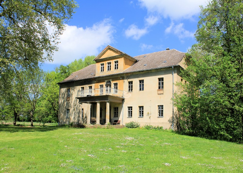 Altes Herrenhaus